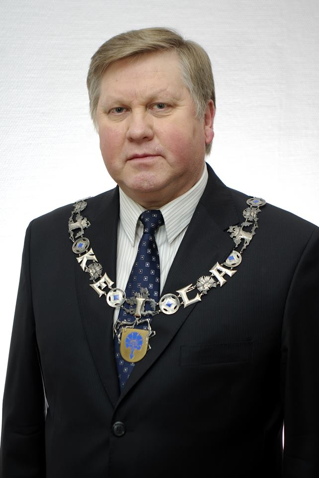 Keila linnapea Enno Fels.